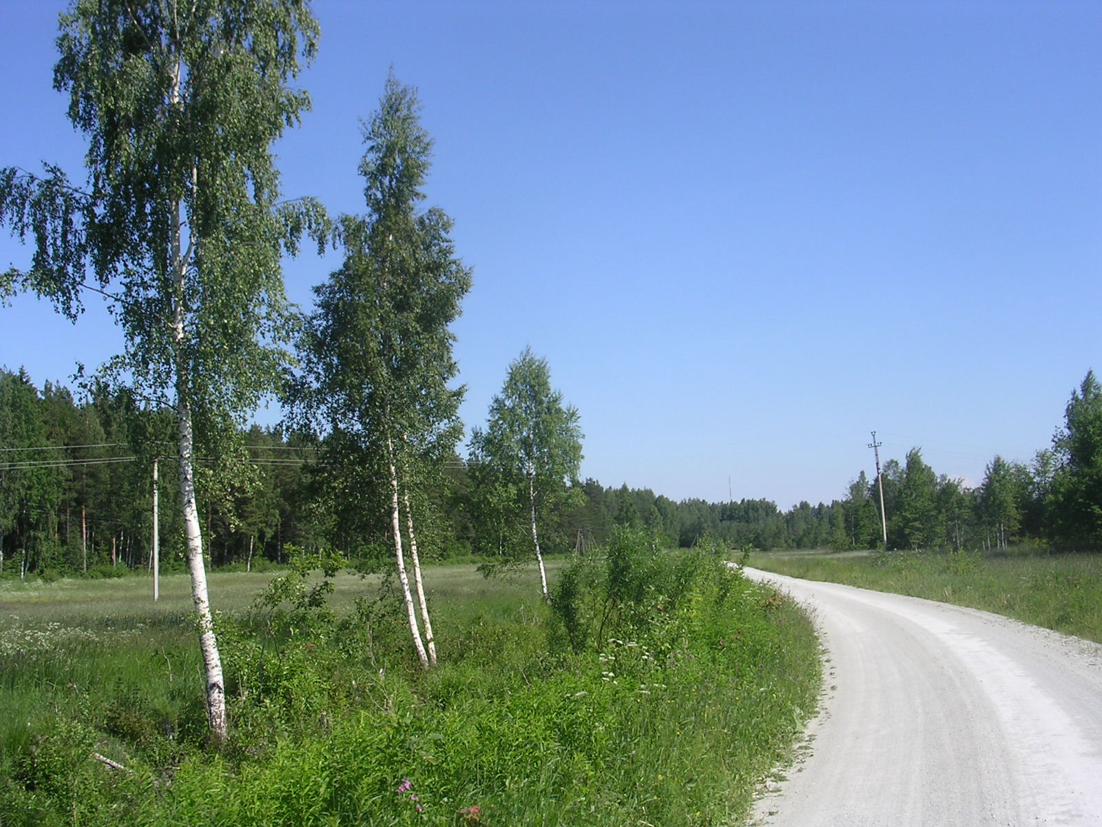 Varudi-Vanaküla